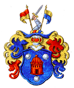 Aatelisvaakuna